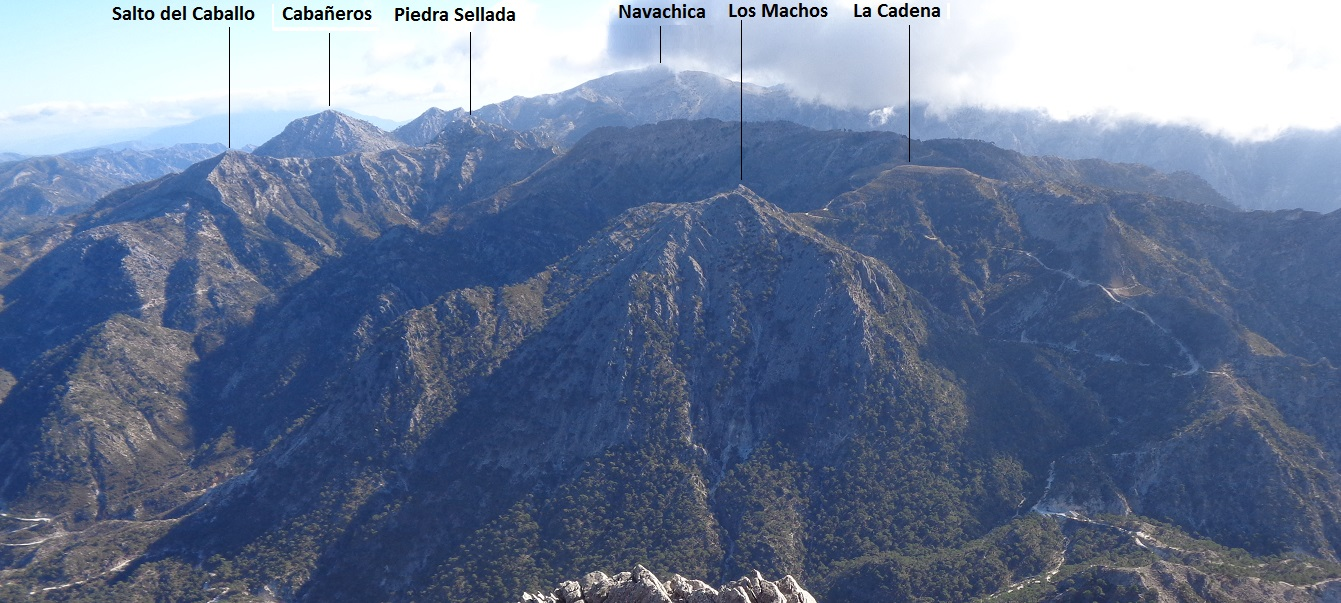 Mucho más escarpada que la occidental, se distingue a lo lejos el macizo de Navachica, el techo de la Sierra de Almijara